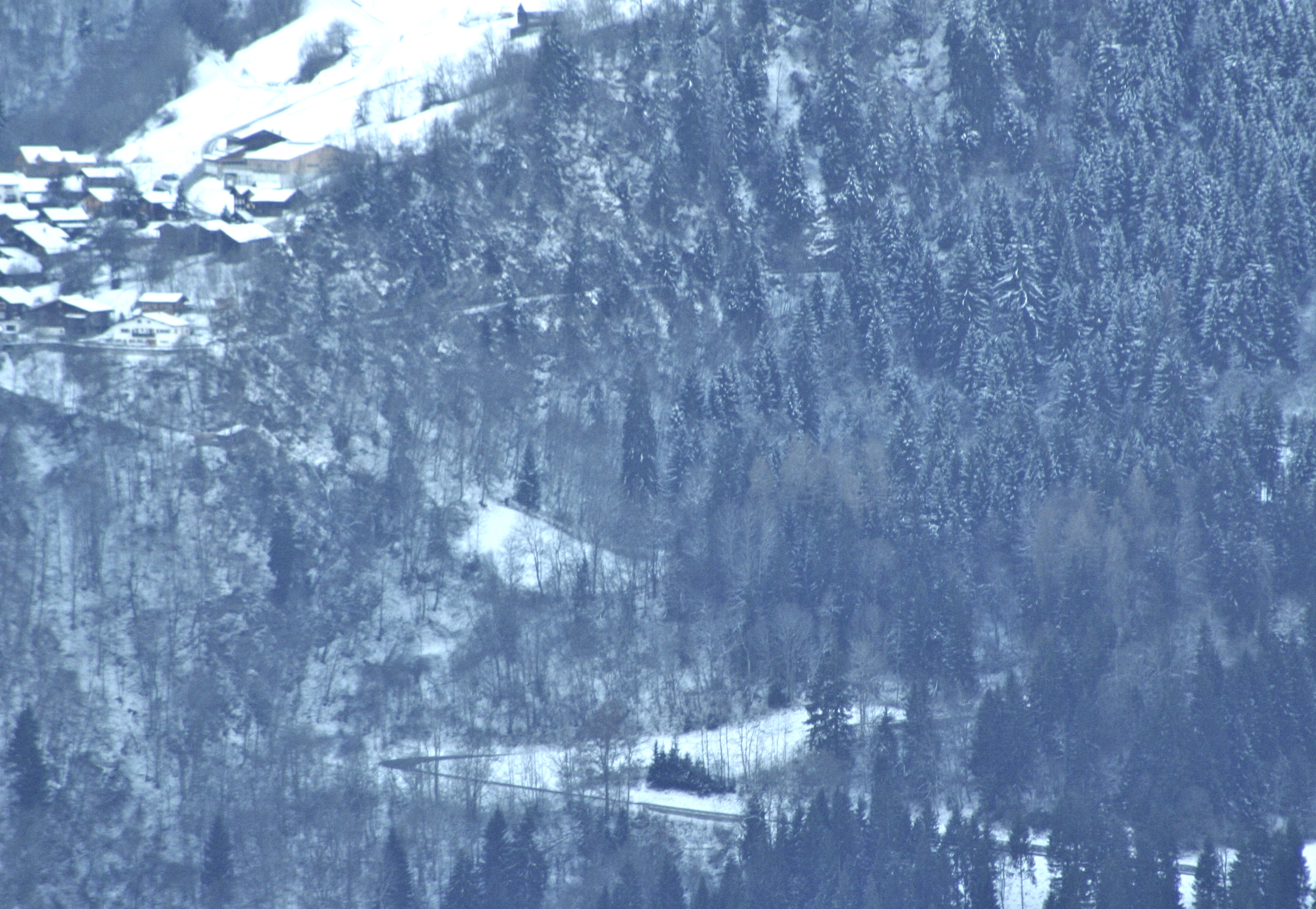 Panera (Luven) in der Bildmitte